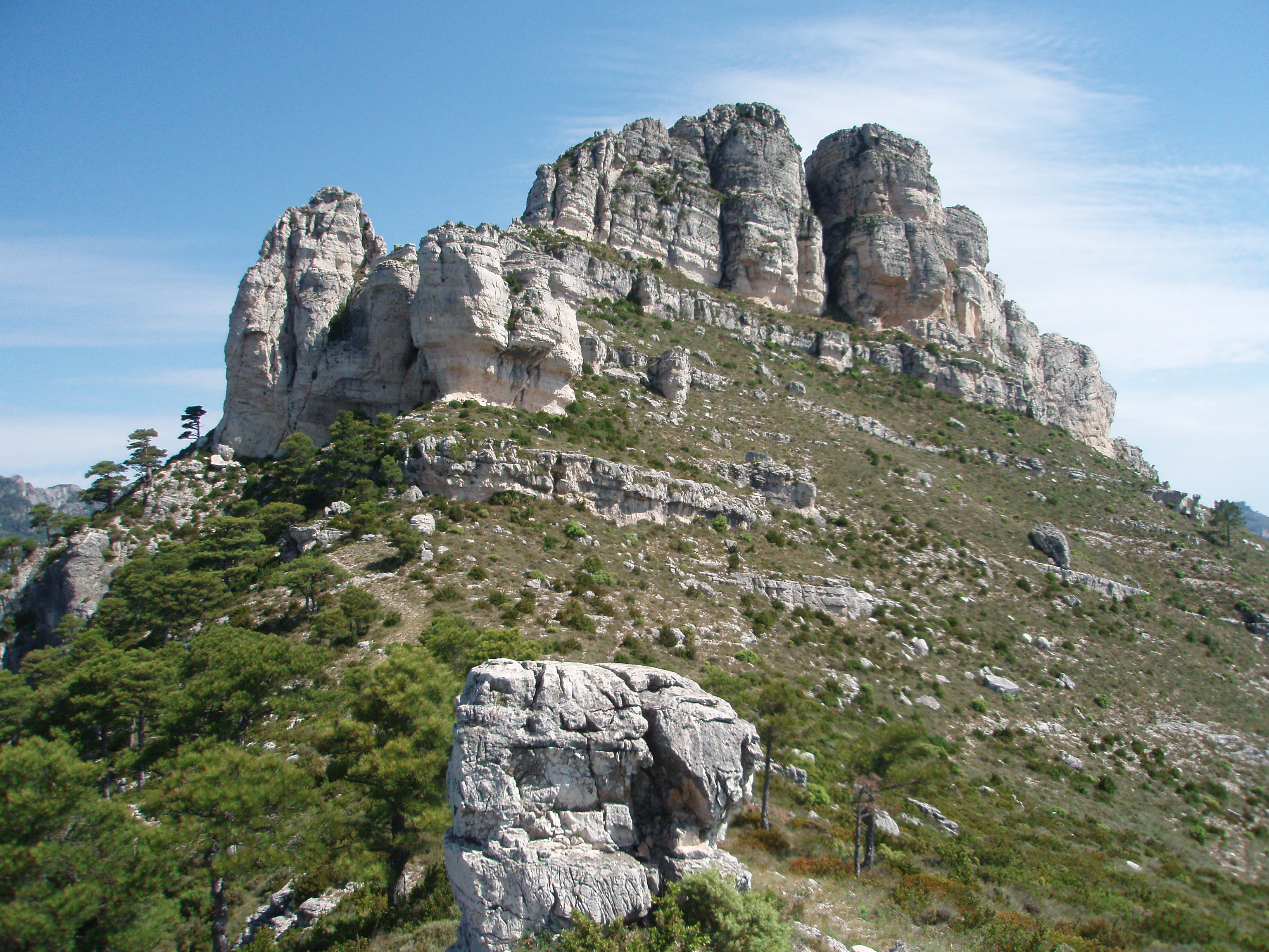 El castell de l'Airosa This is a photography of a Site of Community Importance in Spain with the ID: ES5140011. Natura2000 entry, EEA entry